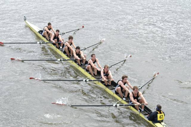 Achter mit Steuermann, aufgenommen am Head of the River 2007, LONDONIKUS